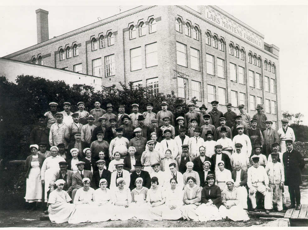 Lars Monténs fabriker, arbetsstyrkan 1915-1929, vid Alviks Strand. Byggnadens adress idag är Gustavslundsvägen 147. Alvik, Bromma, Stockholm.